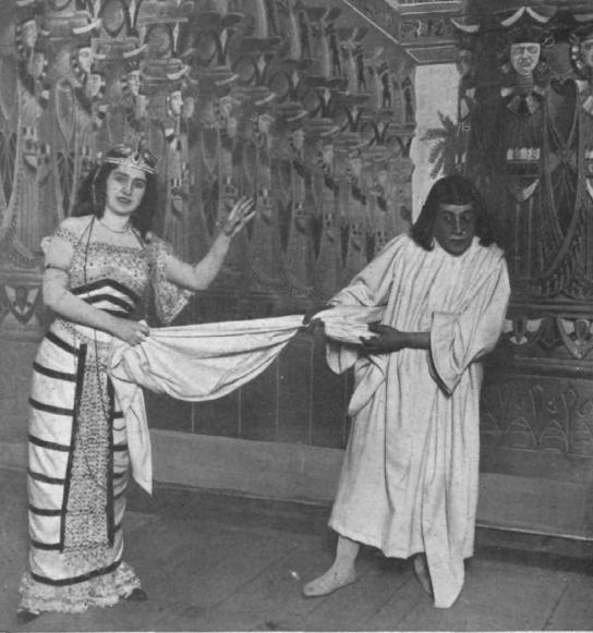 Julia Fons y González en una escena del estreno de la zarzuela La Corte del Faraón en 1910